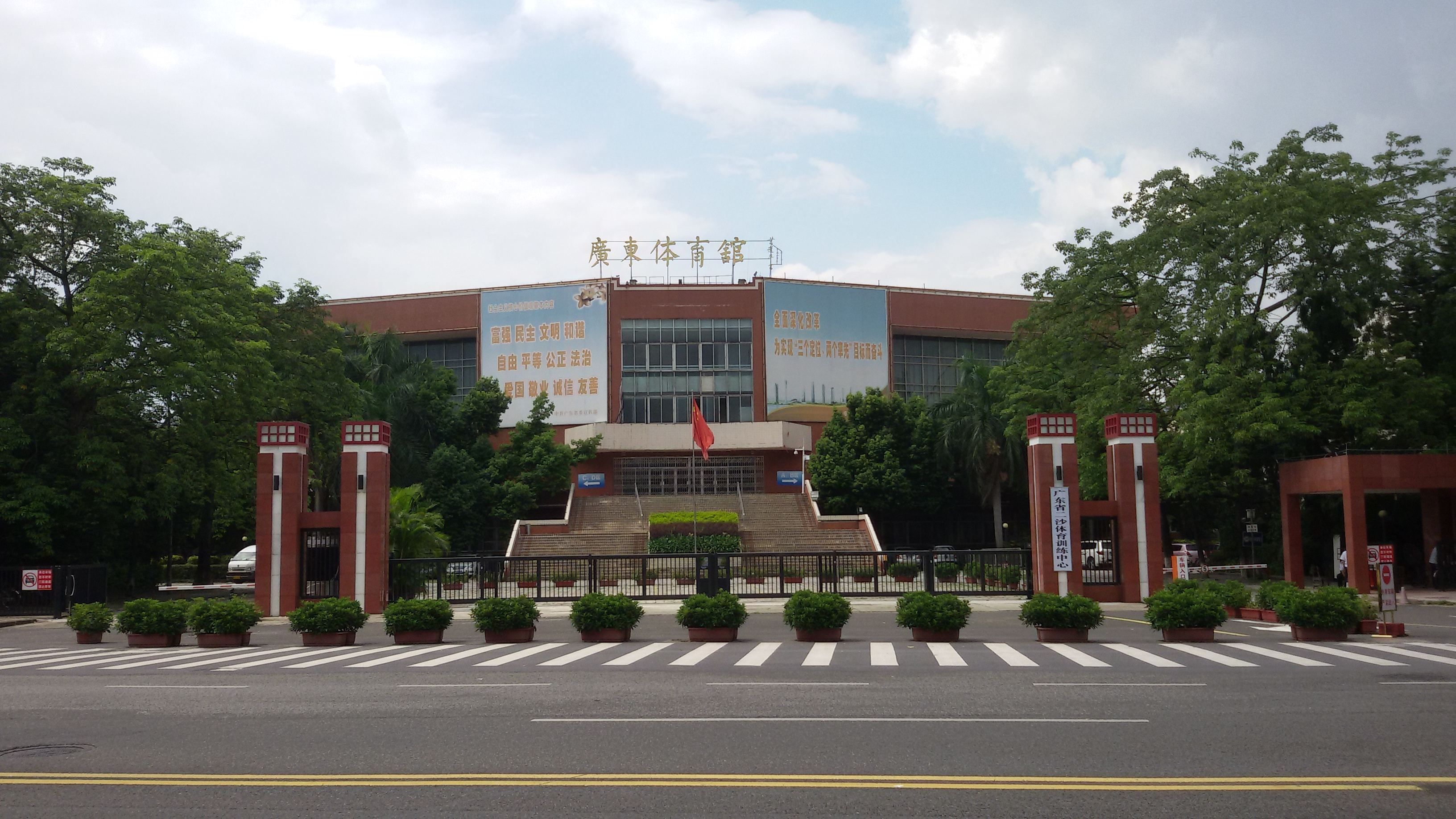 粵語: 廣東省二沙體育訓練中心